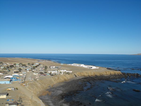 Una Foto tomada desde el cerro de La Cruz.